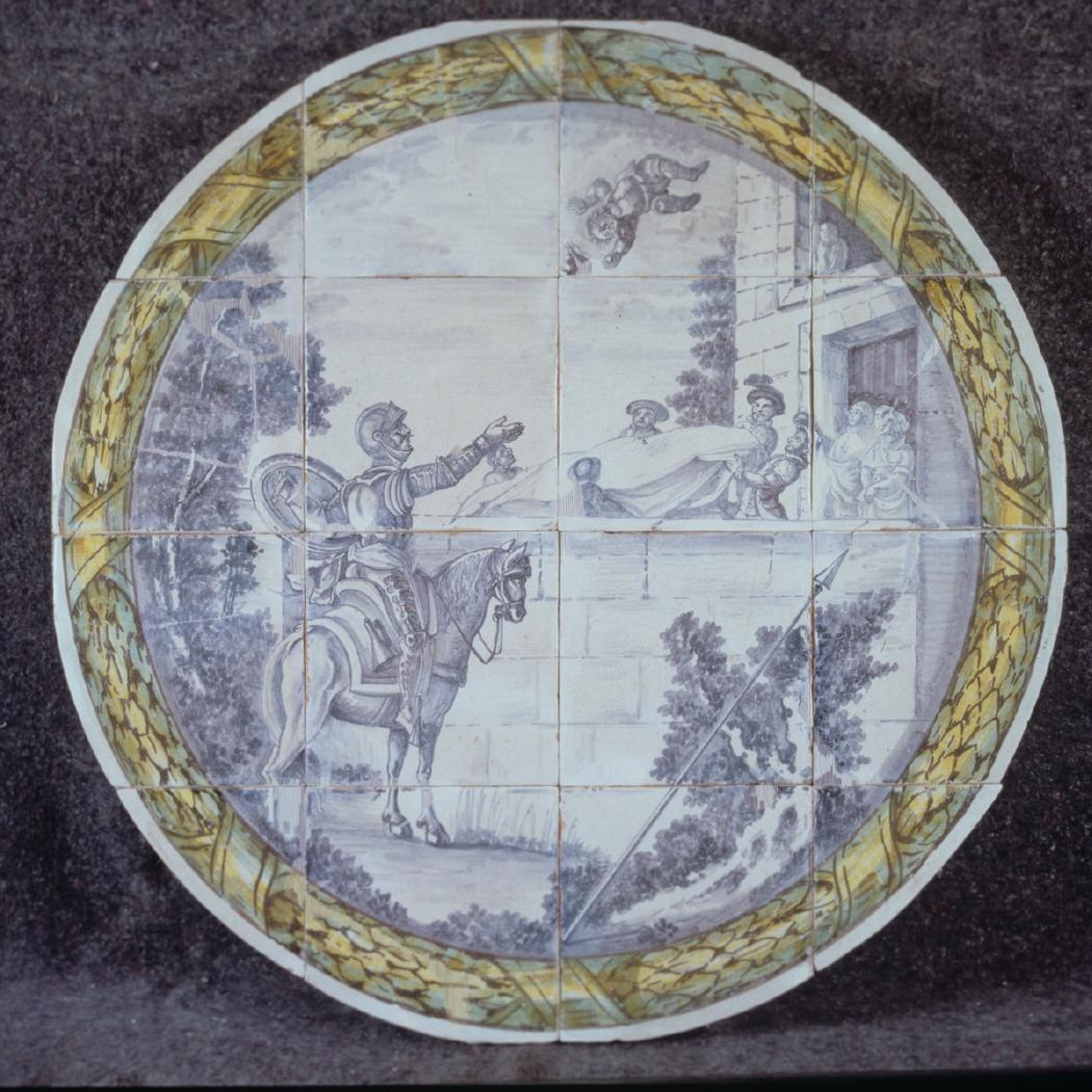 Panel de azulejos representando el manteo de Sancho Panza. Fragmento de pavimento con medallón con una escena del Quijote.